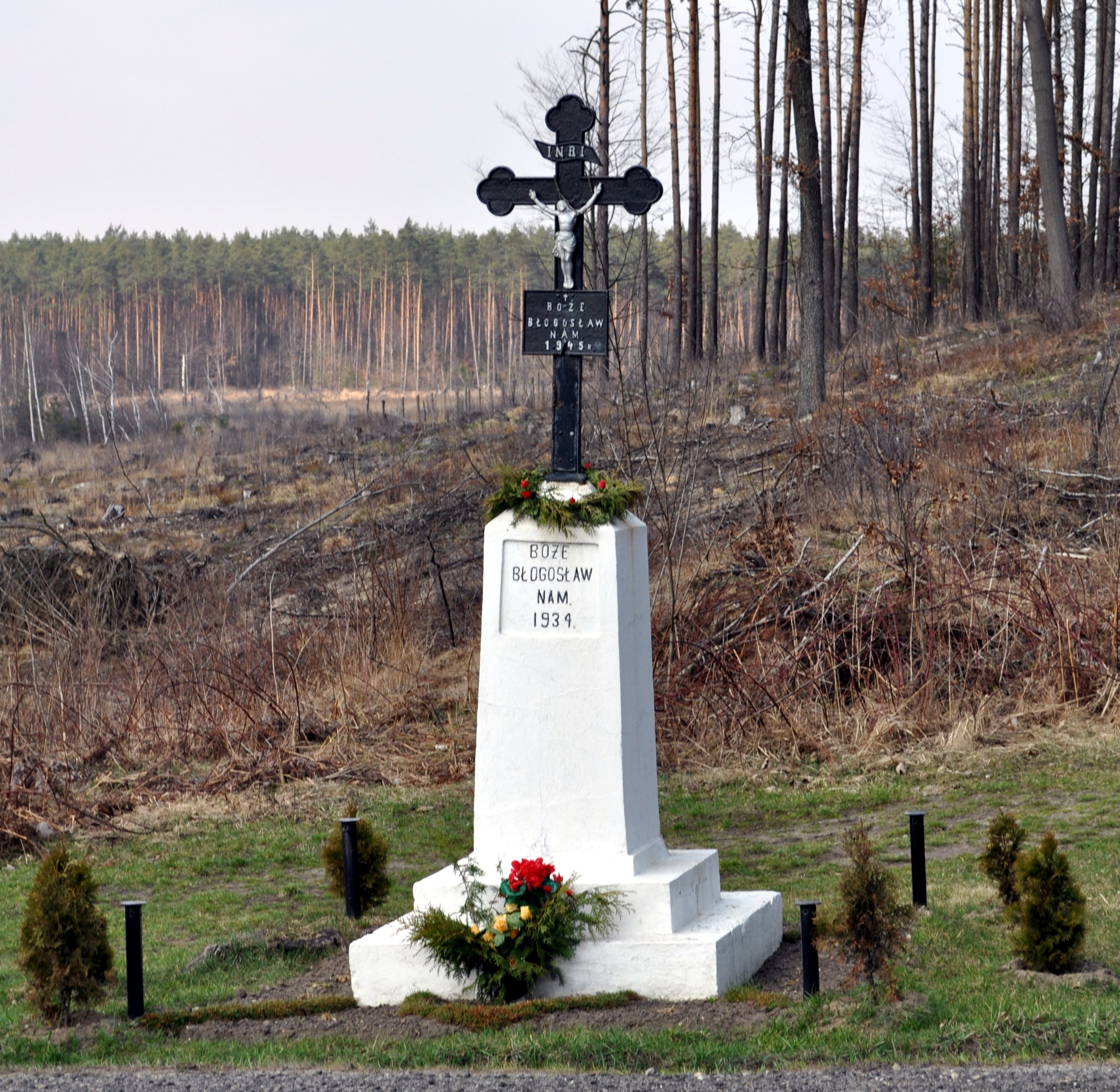 Krzyż znajdujący się przy drodze nr 46 w Trzepizurach (Blachownia). Stoi w pobliżu nieistniejącej pustelni i drewnianego kościółka. Odlany w Hucie Blachownia w 1934 r., obecnie zmieniony po zniszczeniu przez wandali w 1991 r. Dawniej cokół otoczony był kutymi łańcuchami.